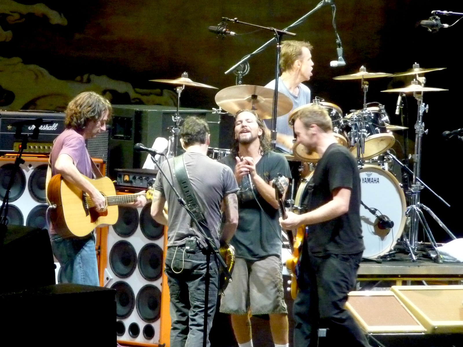 August 2009